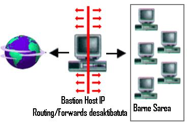 Dual-Homed Host